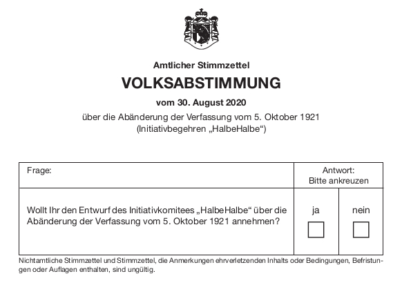 Bulletin de vote référendum Liechteinstein 2020 question 1